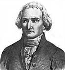 French chemist Pierre Bayen (1725-1798)